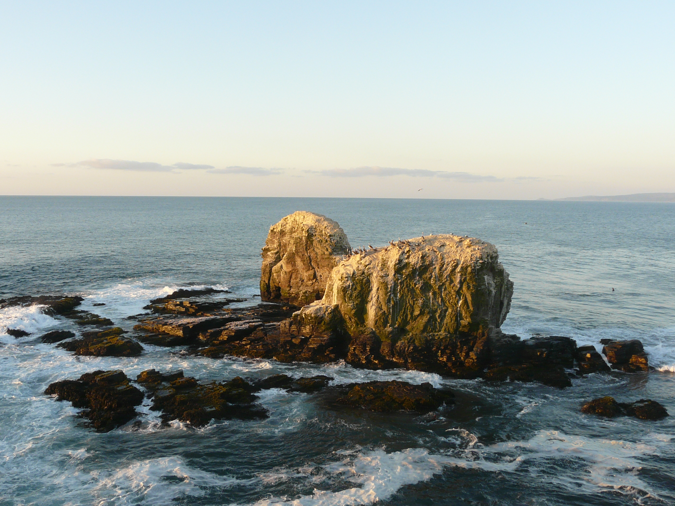 Punta de lobo